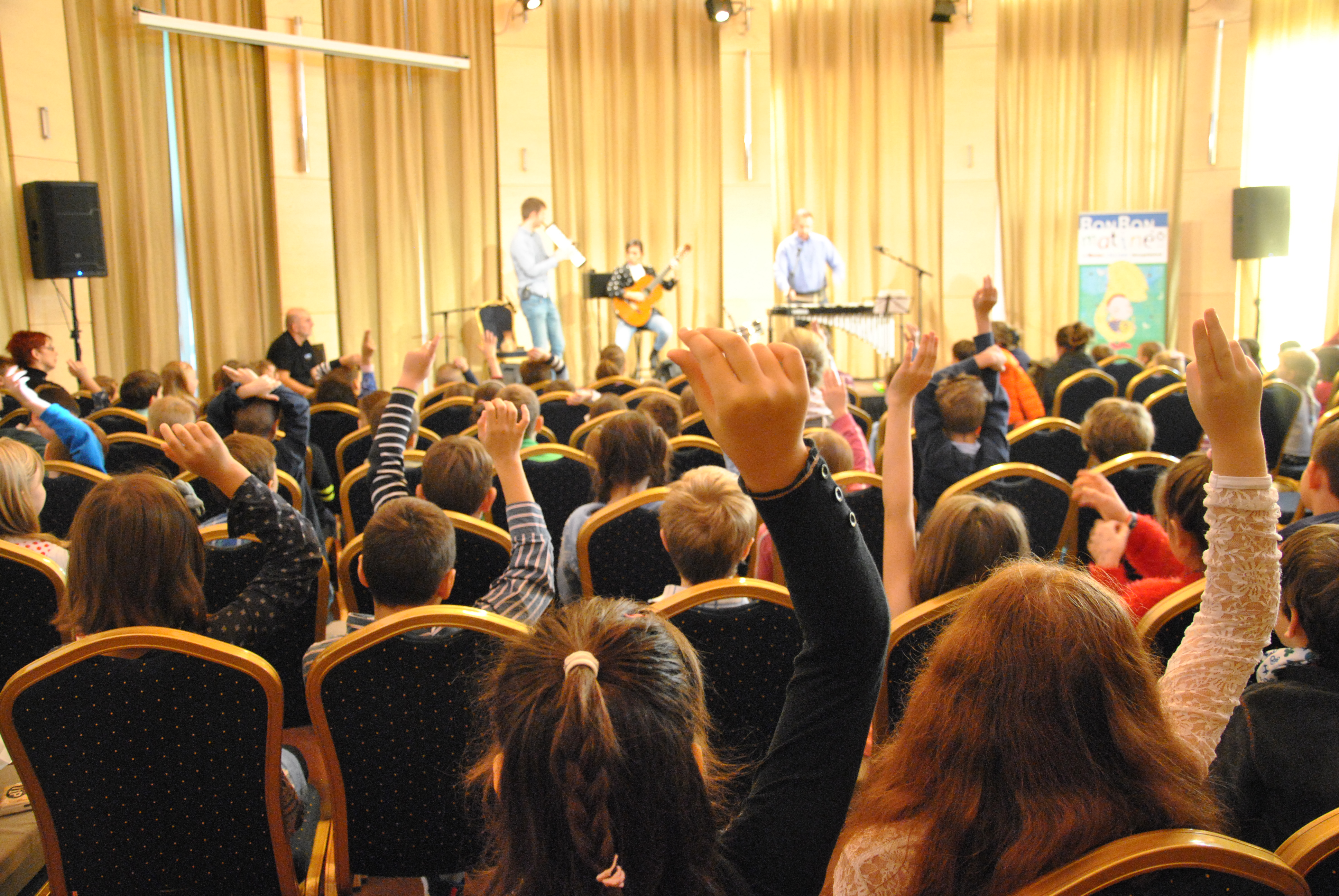 Pillanatkép egy bonbon matinéról. Háttérben a Melodika Project.